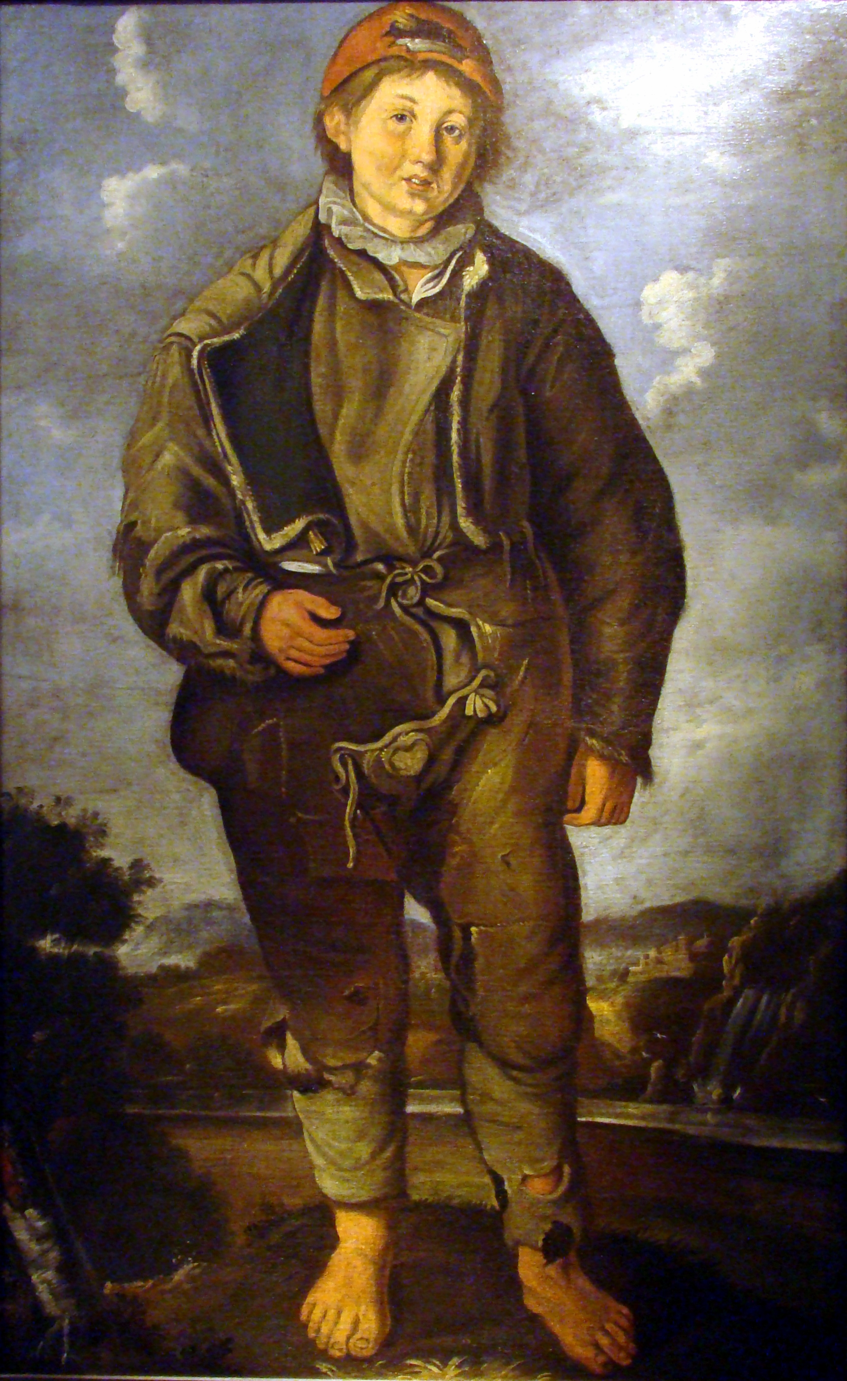 Francesco Maria Capellini, genannt Stechinelli als Betteljunge